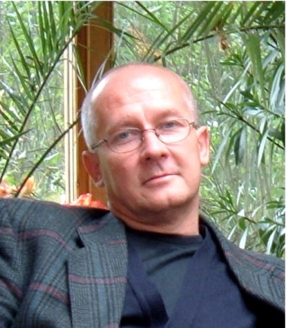 Fotografia wykonana w Petrykozach w 2005 roku